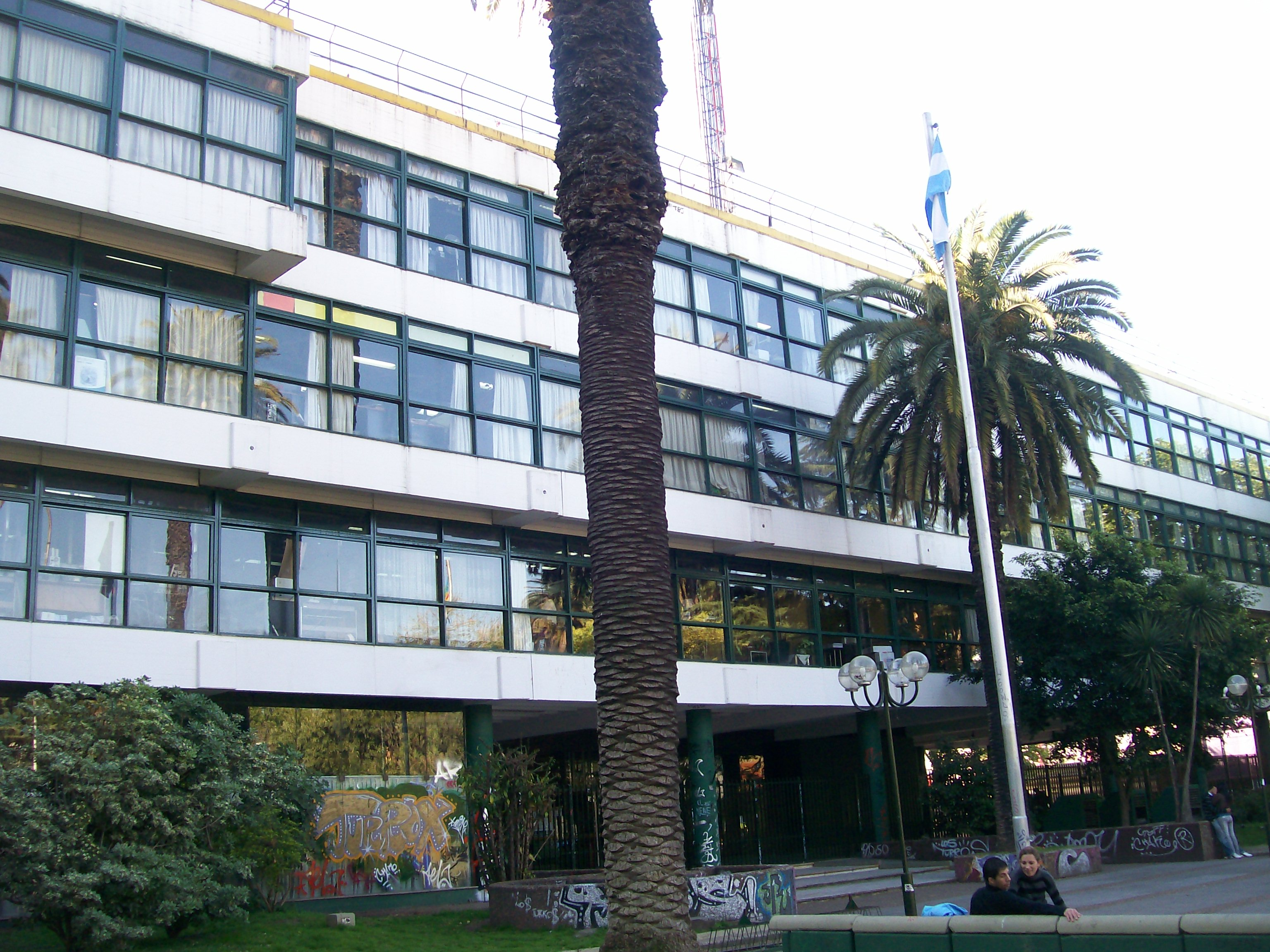 ediuficio de la Municipalidad de San Martin, prov de Buenos Aires.